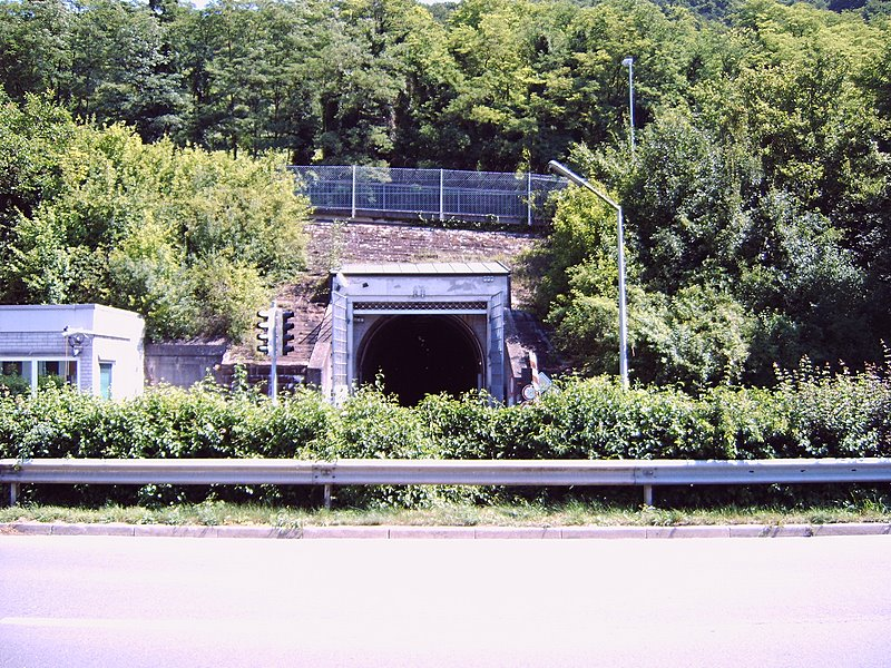 Gipsstollen, einer von mehreren Eingängen zum Stollen